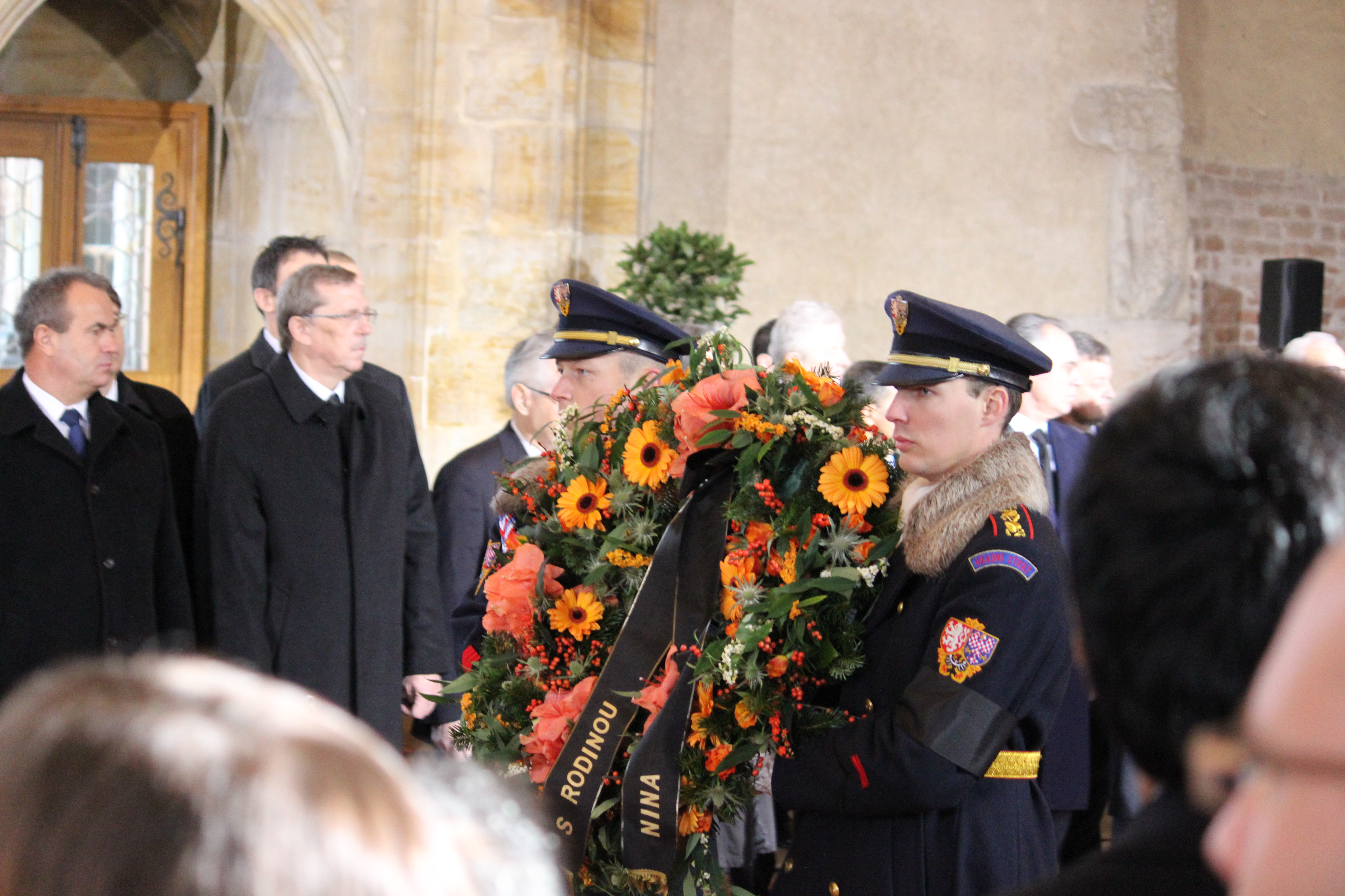 Ve středu 21. 12. 2011 byla rakev s ostatky Václava Havla přemístěna z Pražské křižovatky do Vladislavského sálu Pražského hradu. This photograph was taken with a DSLR from WMCZ's Camera grant.